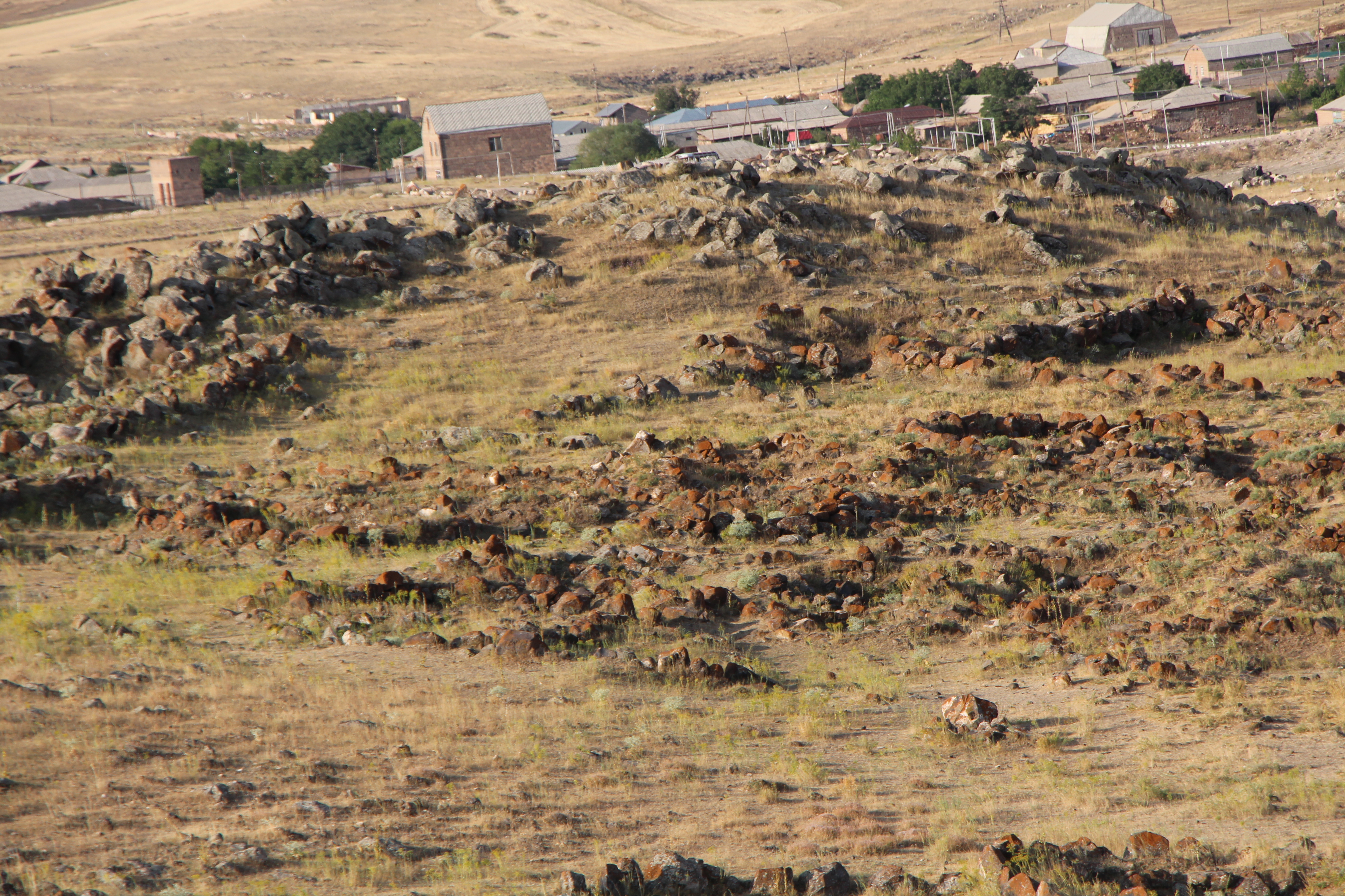 Ցամաքասար, Արագածոտնի մարզ, ԴԱՄԲԱՐԱՆԱԴԱՇՏ մ.թ.ա. 2-1 հզմ հս և ամ մասերում 2.107/2 107/2